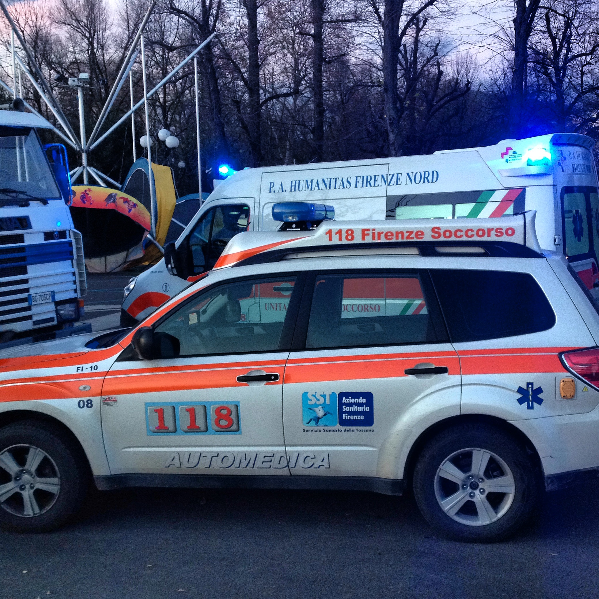 MSA+MSB